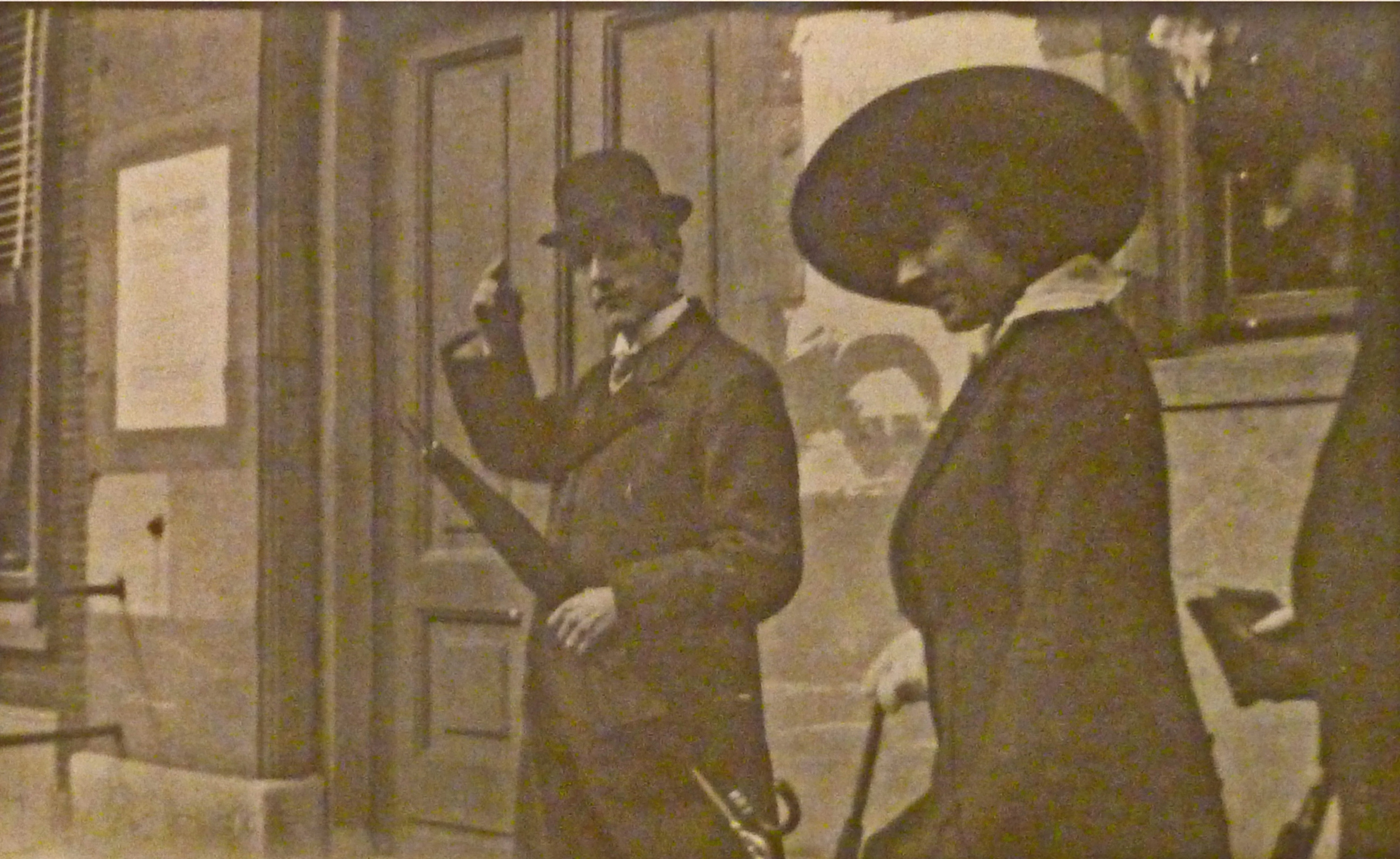 Photo of the Belgian painter Jules Schmalzigaug; by anonymous; private collection